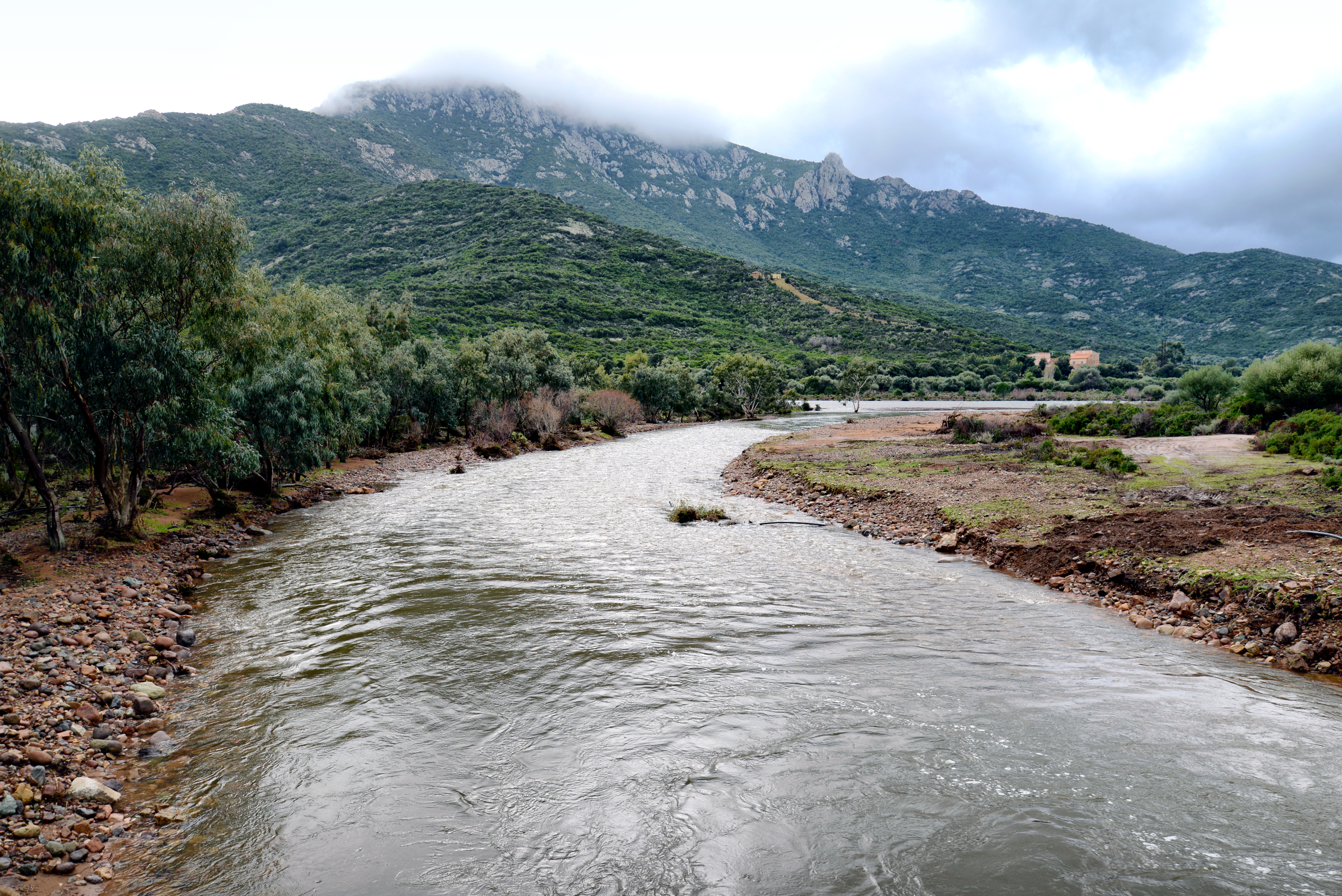 Galéria, Filosorma/Balagne (Corse) - Le ruisseau de Marsolinu en aval du pont de la route D81, proche de sa confluence avec le Fango, au lendemain d'une forte crue.